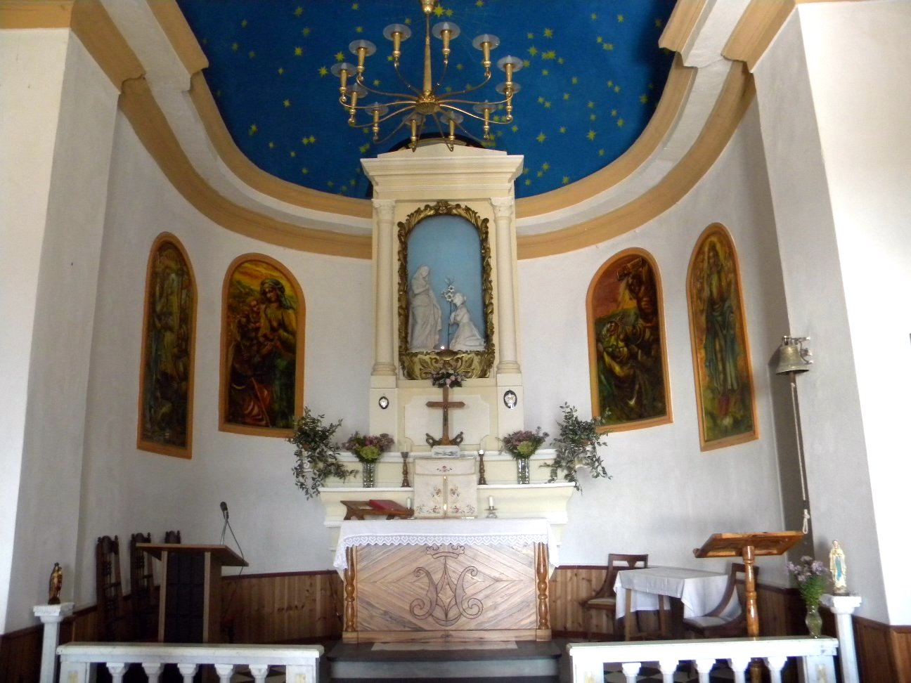 Altare del santuario della Madonna di Caravaggio, Rapallo, Liguria, Italia